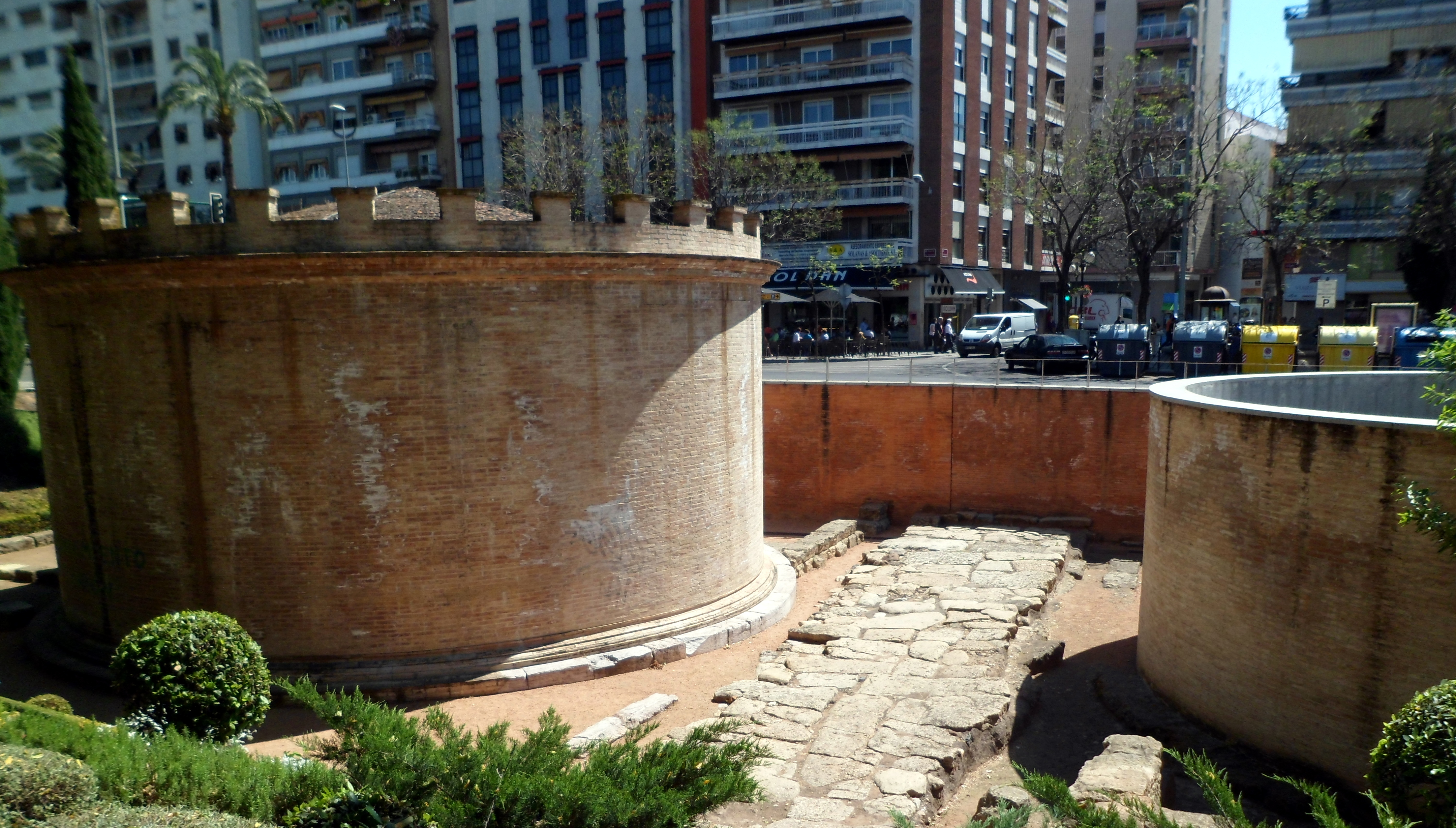 Monumentos funerarios de la Puerta de Gallegos, Córdoba (España).